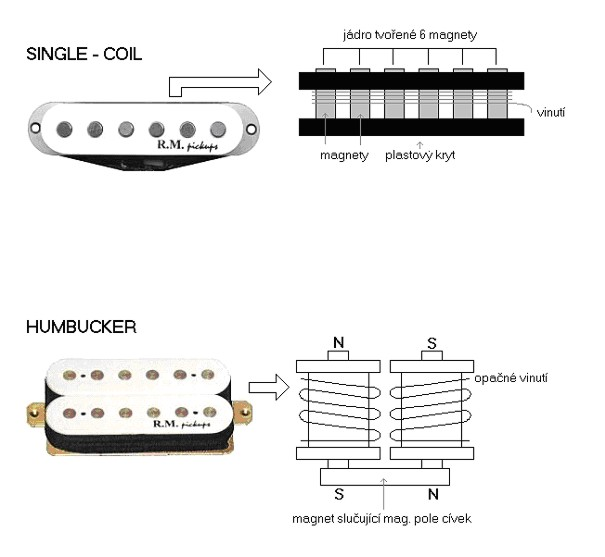 Snímače na elektrofonické kytaře